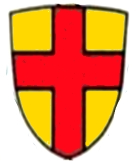 Wappen des Erzbistums Freíburg